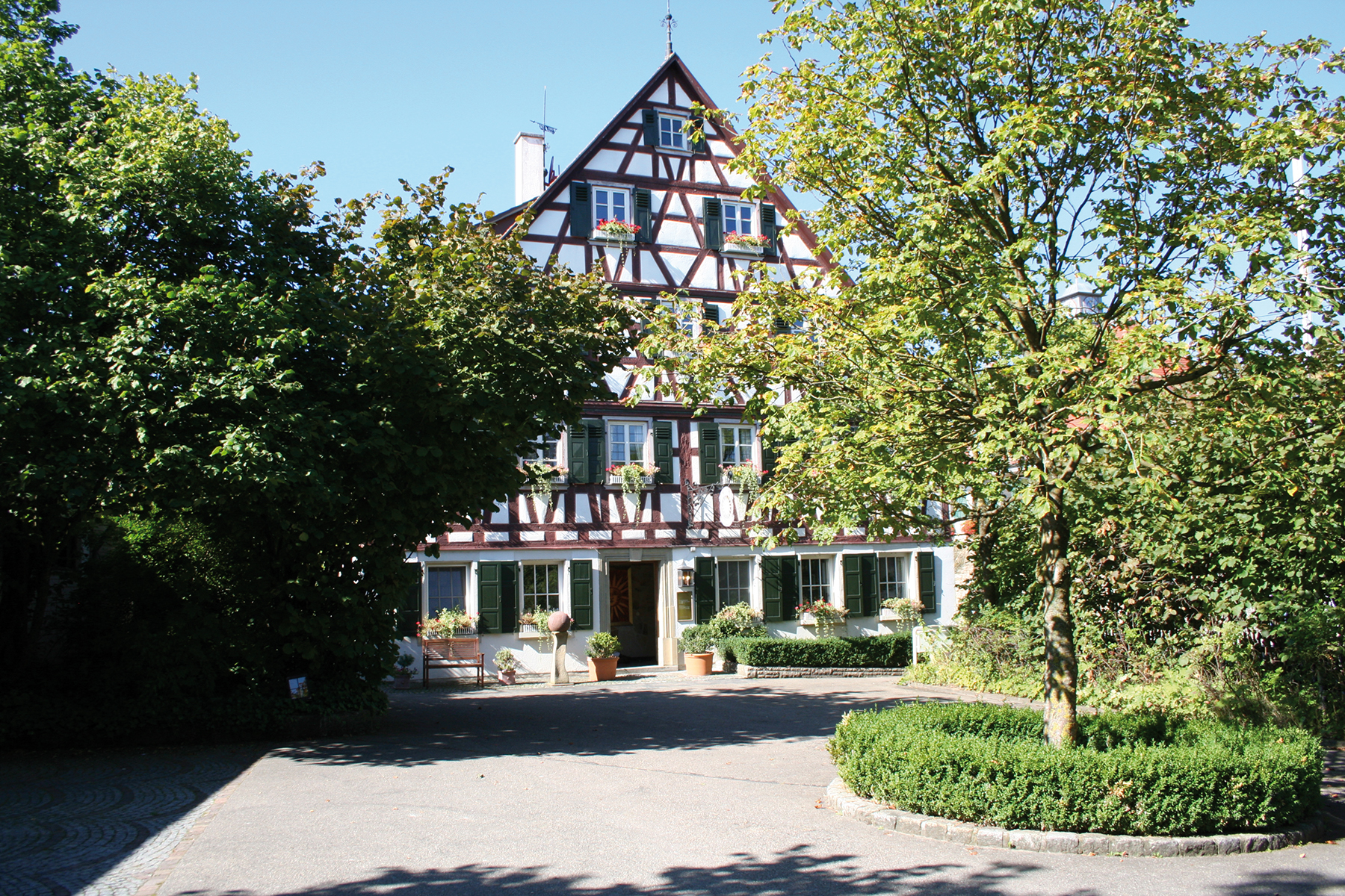 Sonnenhof Wolpertshausen - Gründungsort der Bäuerlichen Erzeugergemeinschaft Schwäbisch Hall